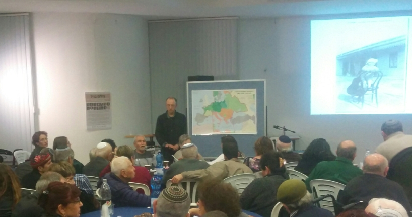 כנס עולי המעפיל האלמוני ובני משפחותיהם, ניר גלים, מרץ, 2017